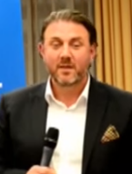 Yiğit Bulut 2023 Hedef Büyük Türkiye konulu konferansta konuşma yapıyor.